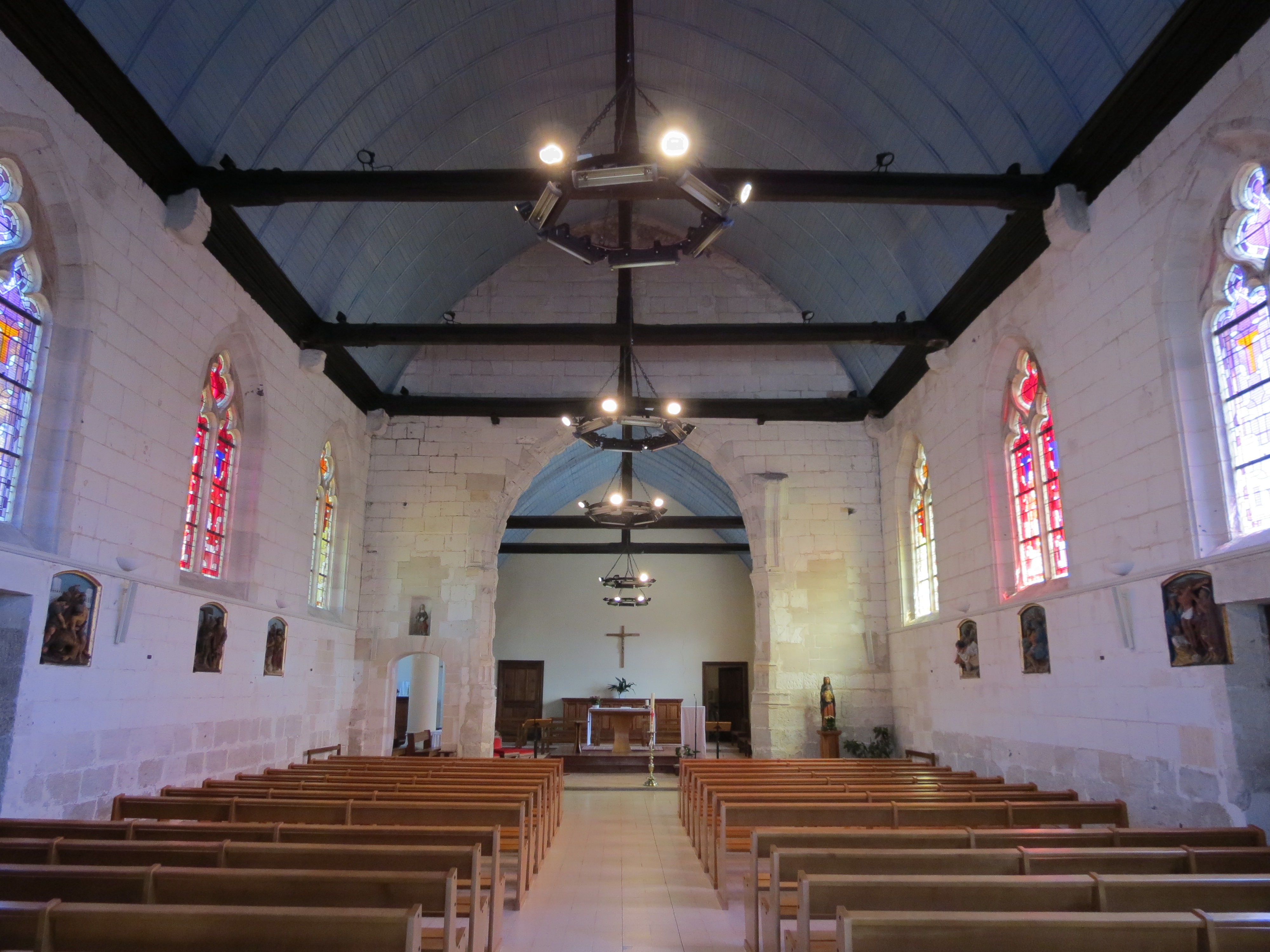 Église de Saint-Étienne-du-Rouvray